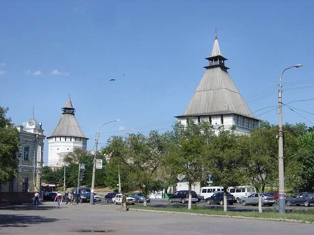 Astrachan, Kremlin. Eigen foto Mark Voorendt, juli 2005.